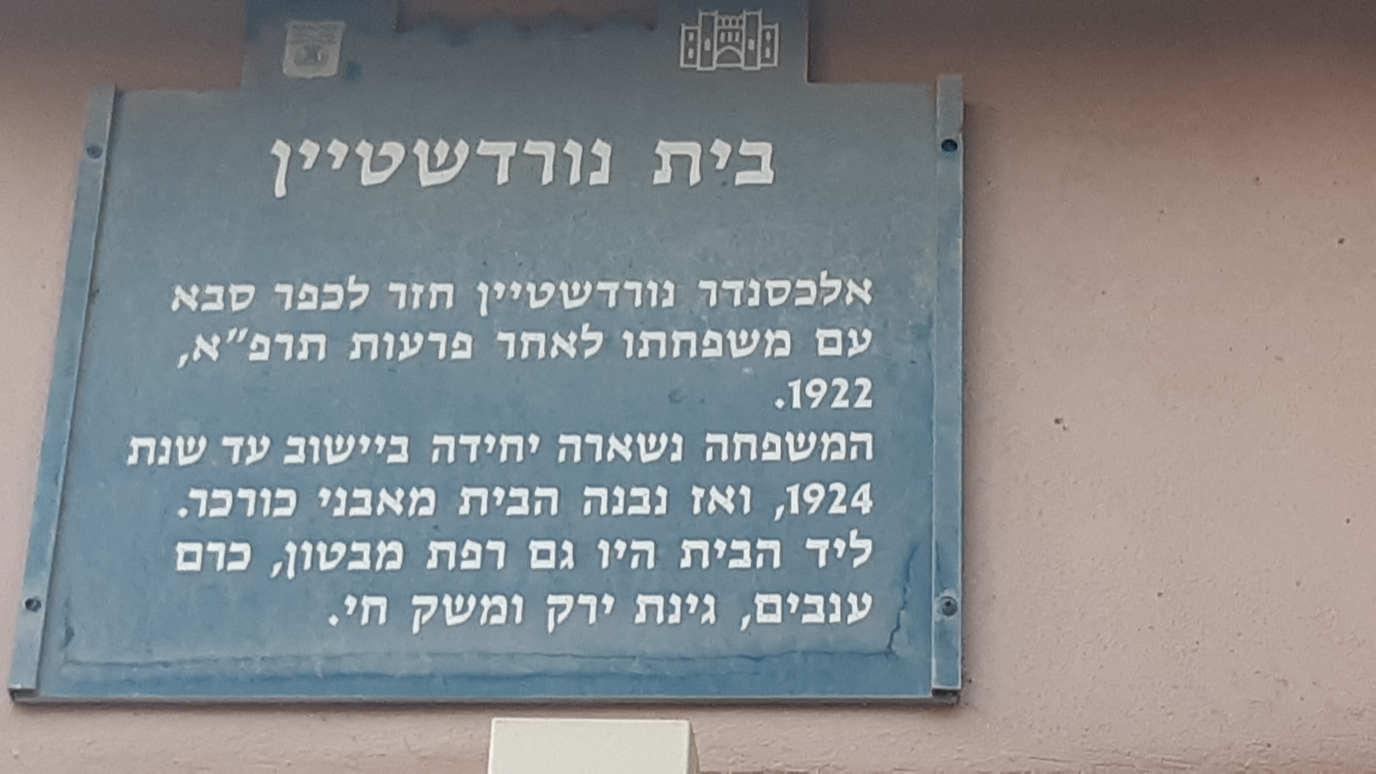 בית נורדשטיין - כפר סבא